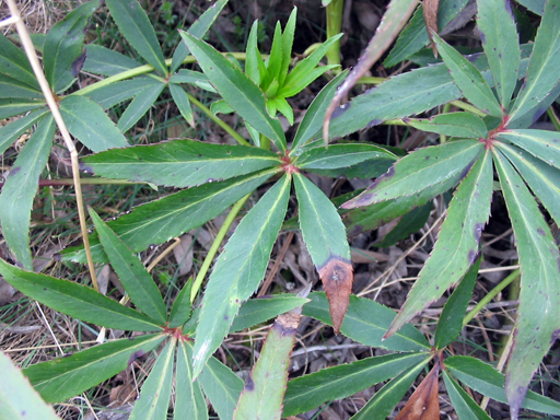 Helleborus foetidus detalle